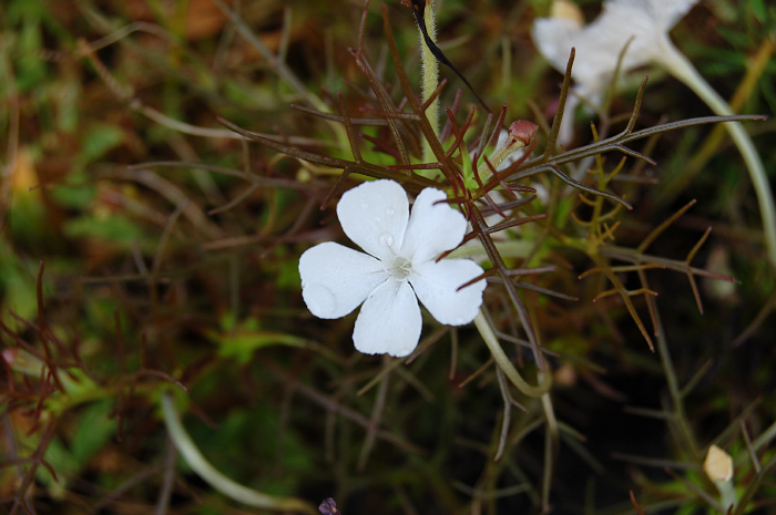 Rhamphicarpa fistulosa (syn. Rhamphicarpa longiflora)